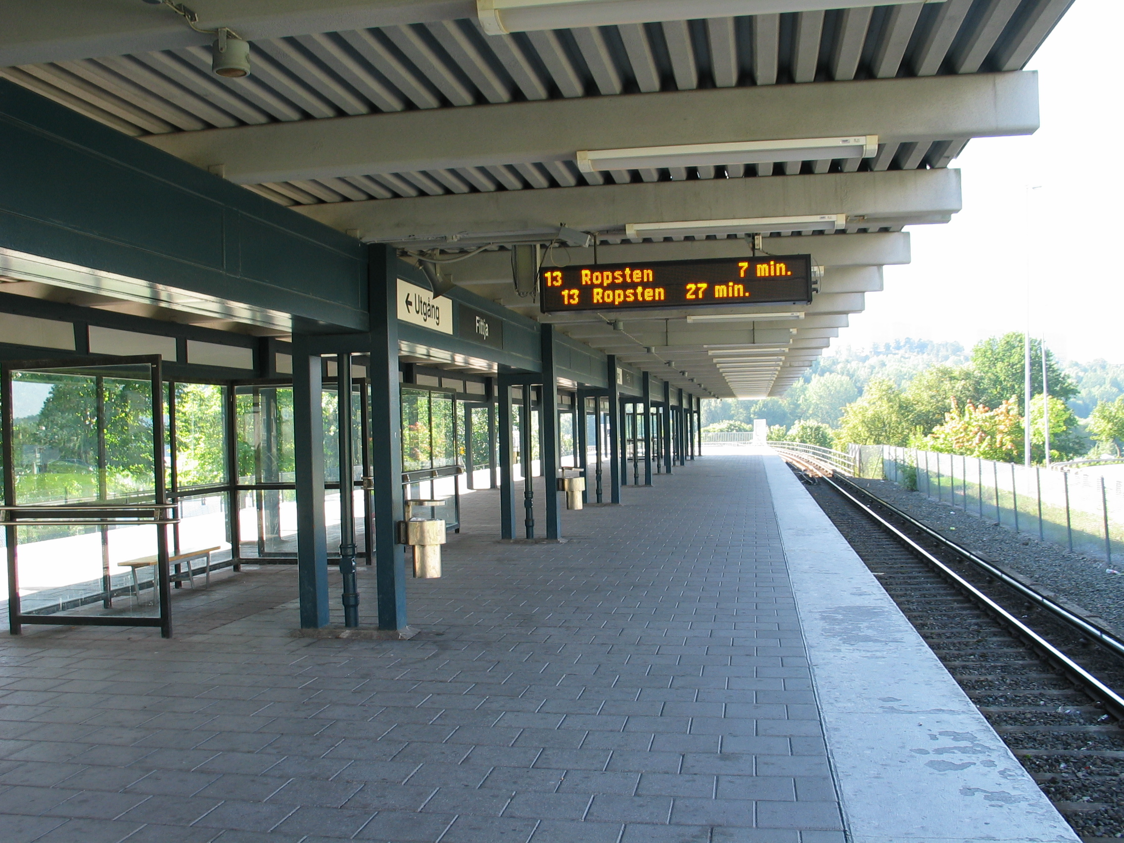 Fittja, a metro station in Stockholm, Sweden.